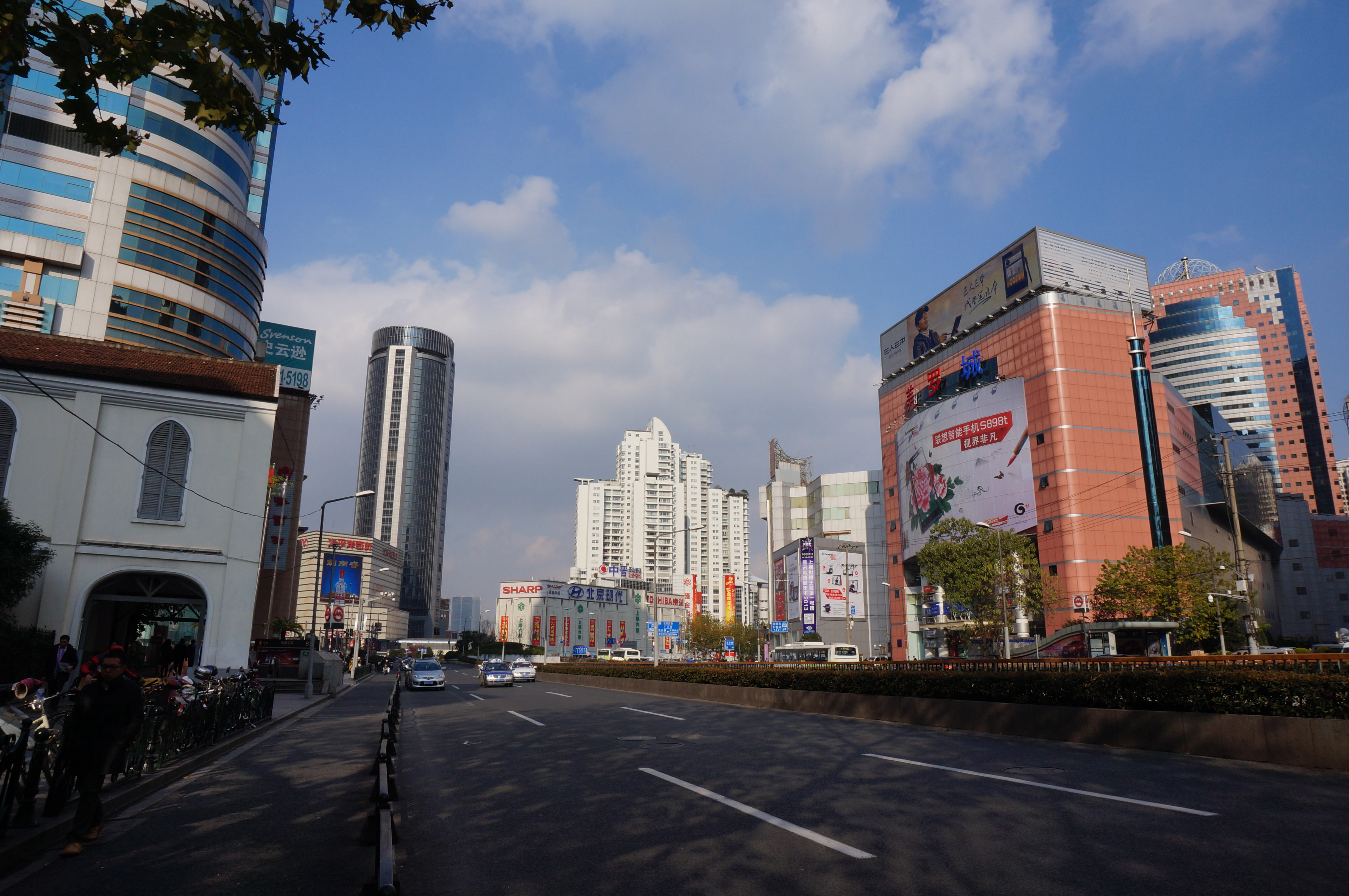 由漕溪北路进入徐家汇